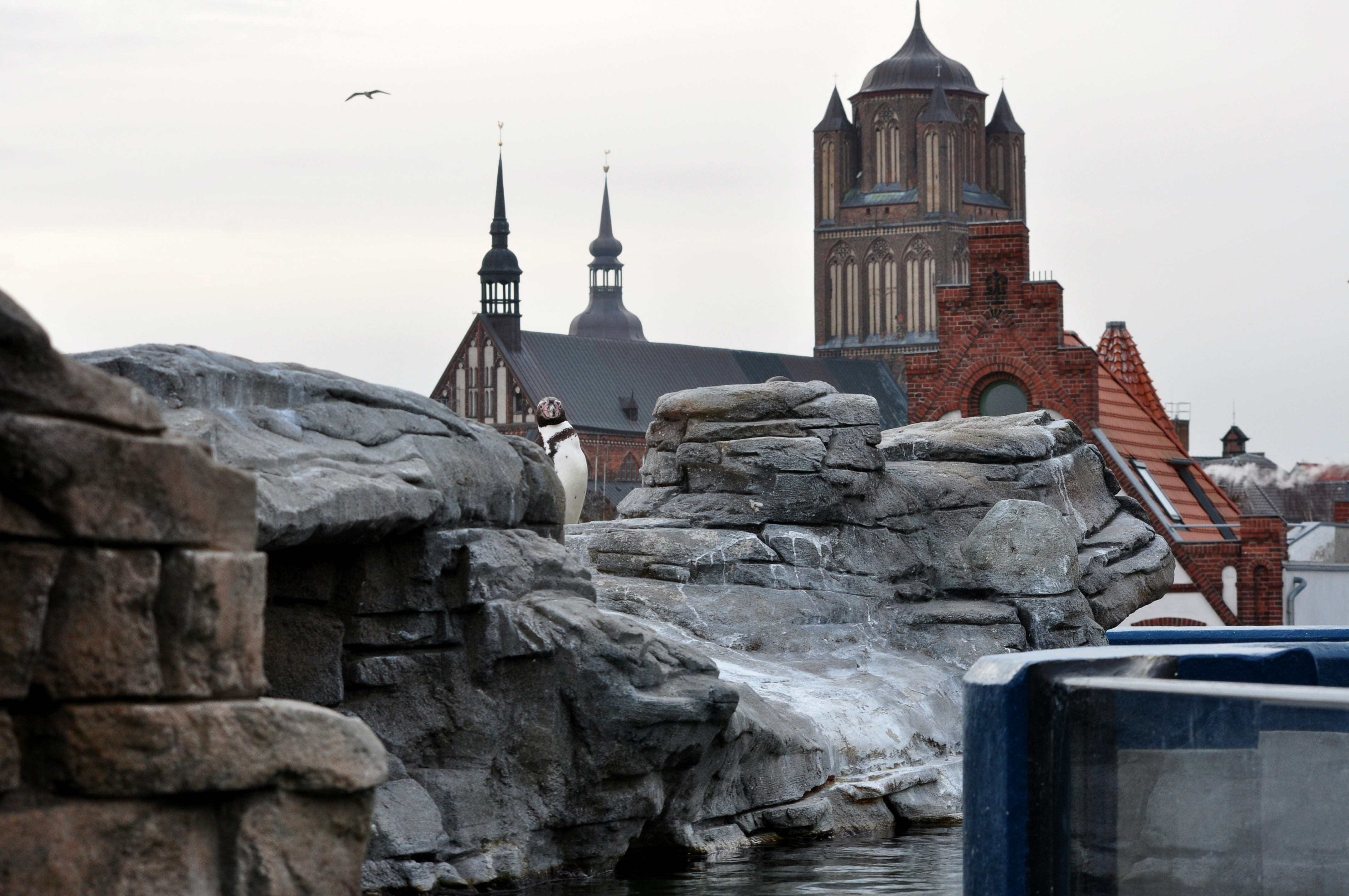 Die Pinguinanlage auf dem Dach des Ozeaneums in Stralsund. Im Hintergrund die Jakobikirche.